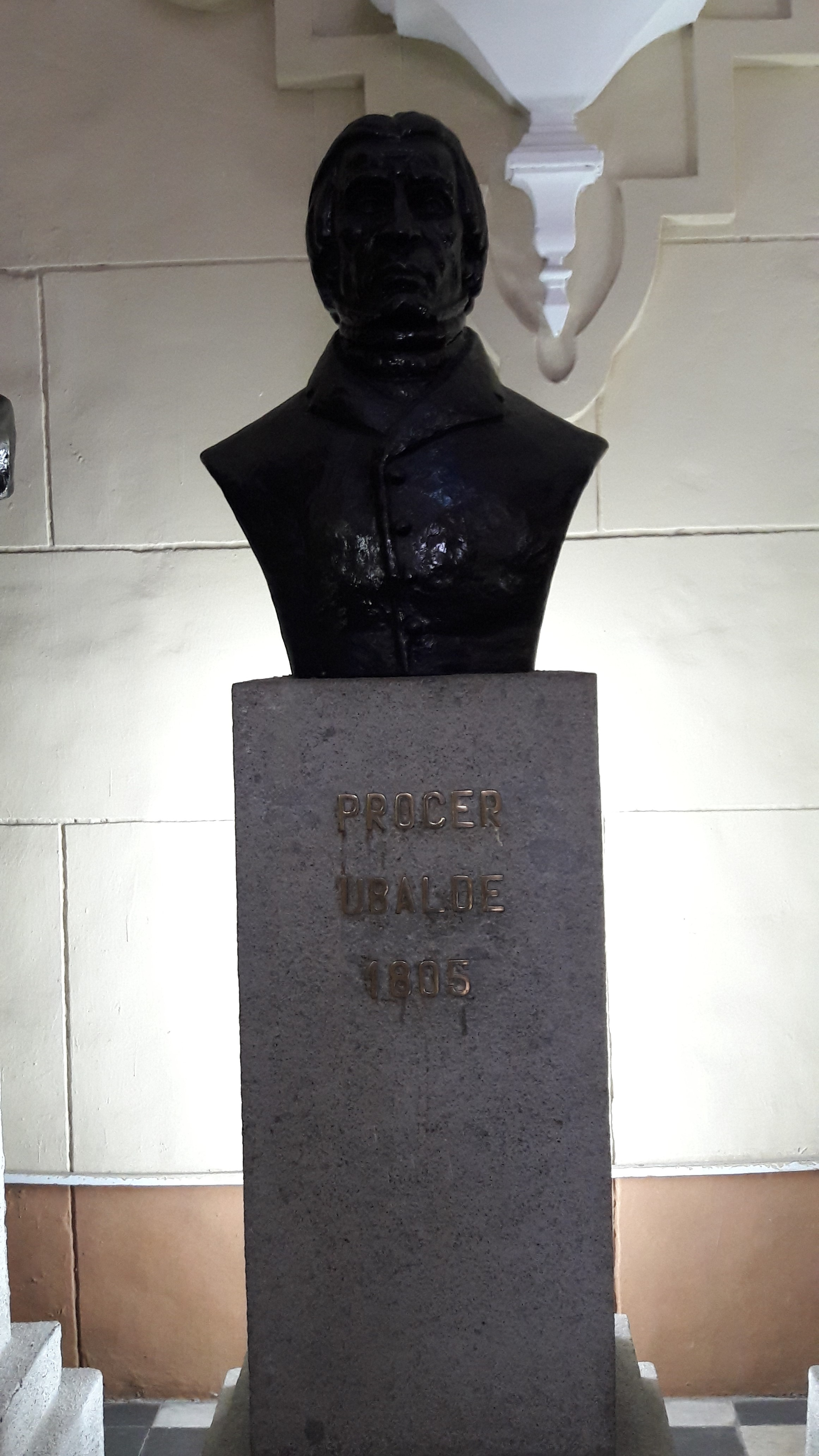 Prócer Ubaloe 1805